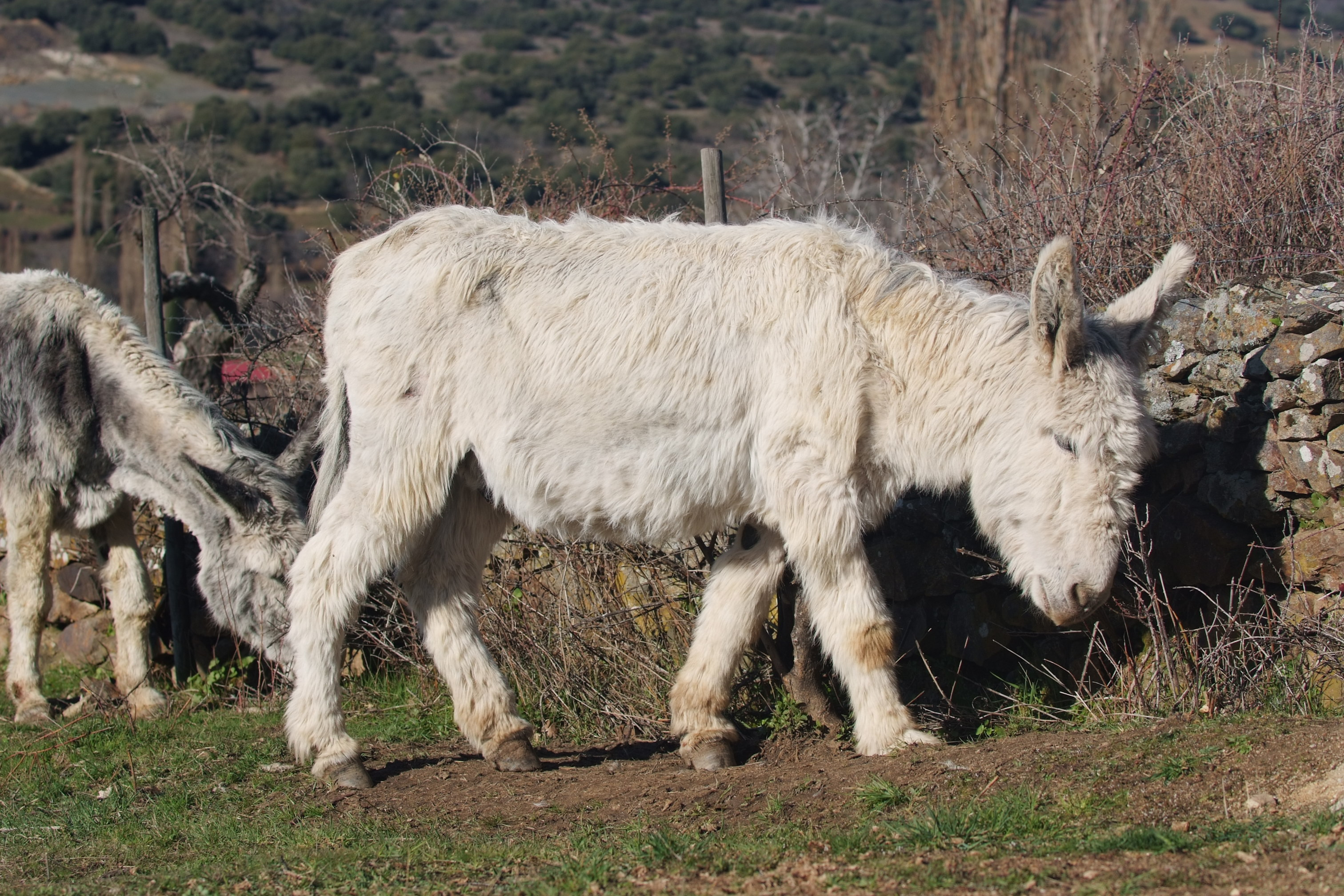 Burro pastando en las cuestas de Villafranca de la Sierra (Ávila; España)